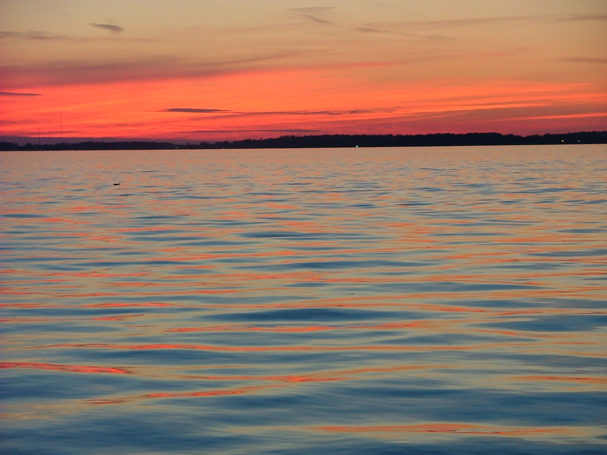 Sunset over Grand Lake St Marys in Ohio